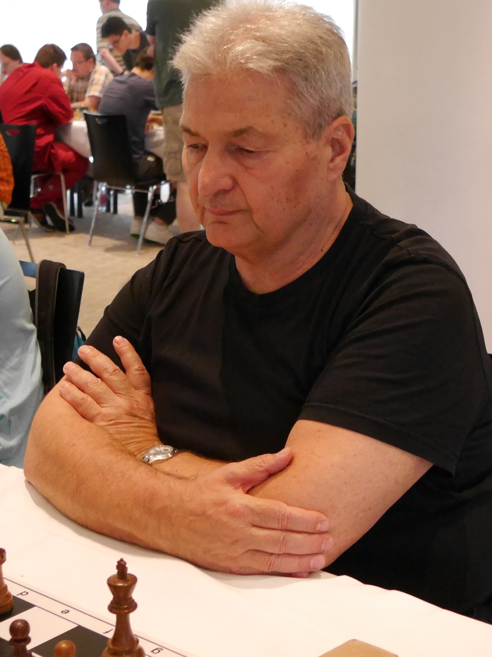 Iván Faragó, ZMDI Schachfestival Dresden 2016.